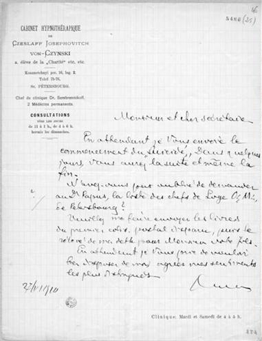 Мед. бланк на франц. языке о сеансе гипнотерапевта Чинского Ч.